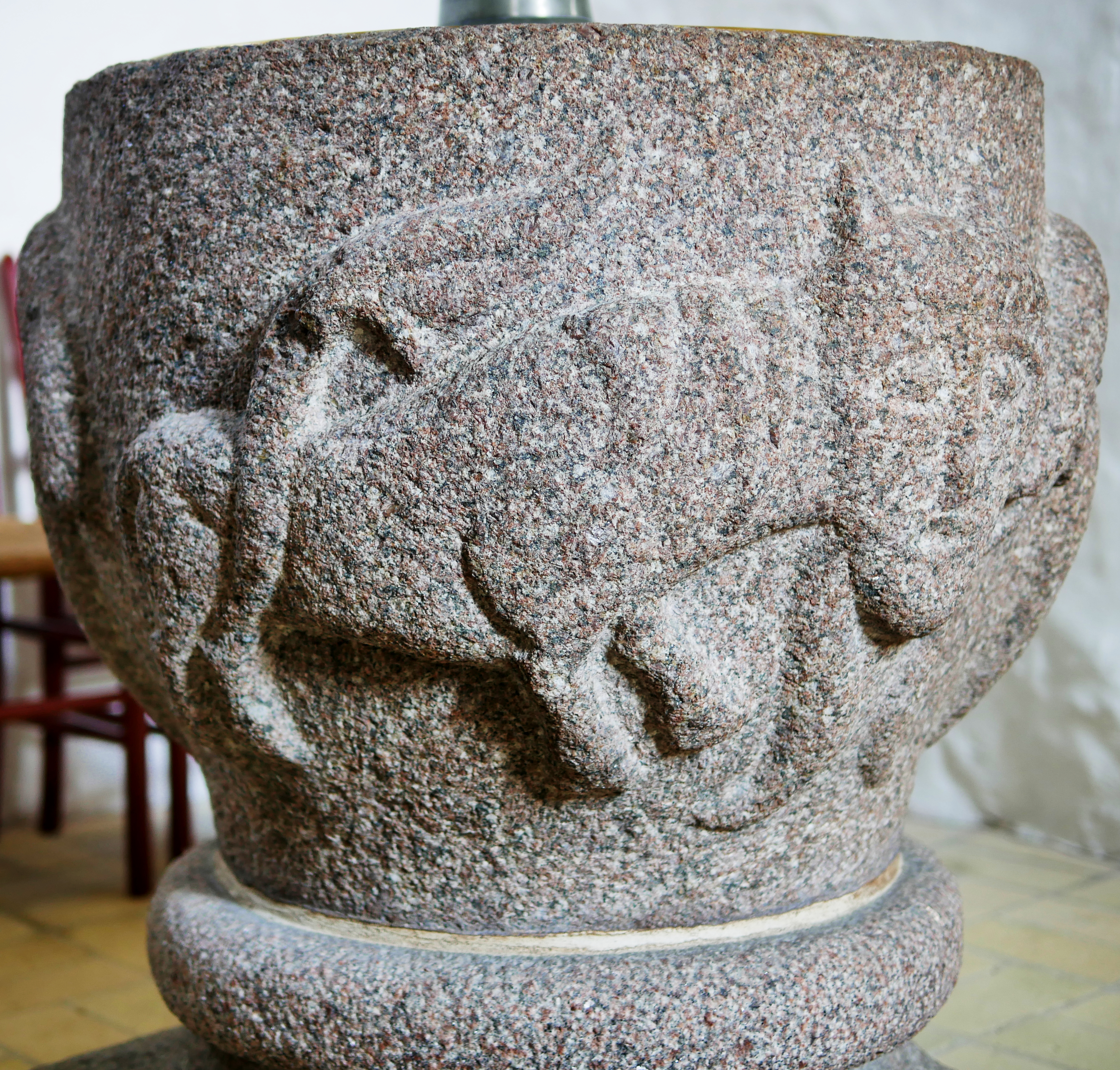 Kirche von Vive am Mariagerfjord (Dänemark, Nord-Jütland)- Erbaut etwa 1250, schöne Innenausstattung: romanischer Taufstein, Renaissacealter, Kanzel aus dem Historismus, moderne Orgel Romanischer Taufstein